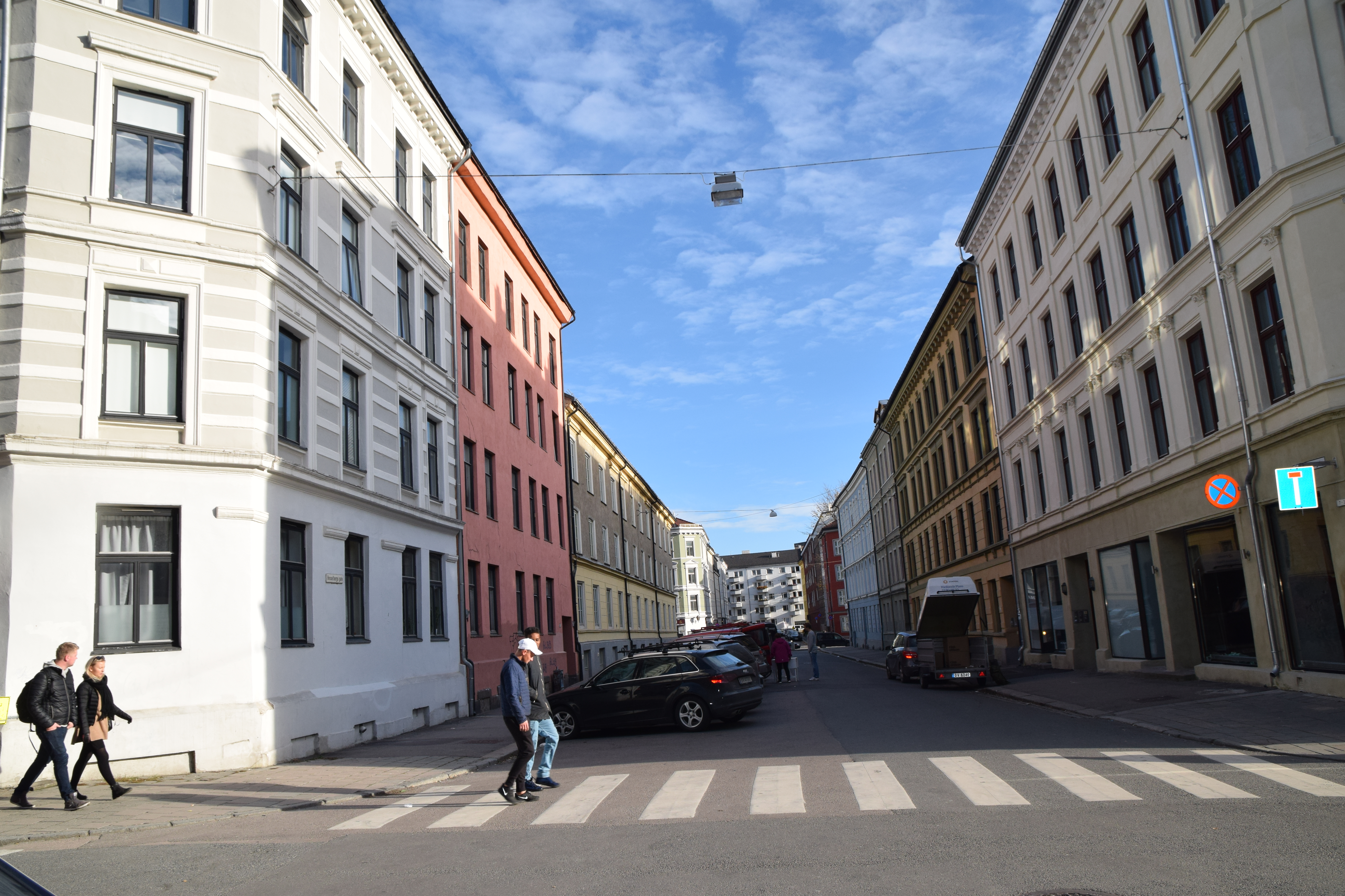 Hesselbergs gate sett fra Thorvald Meyers gate, med skyggevirkning 30. oktober kl. 13.30, fire etasjer, orientering øst-vest, 15,7 meter gatebredde